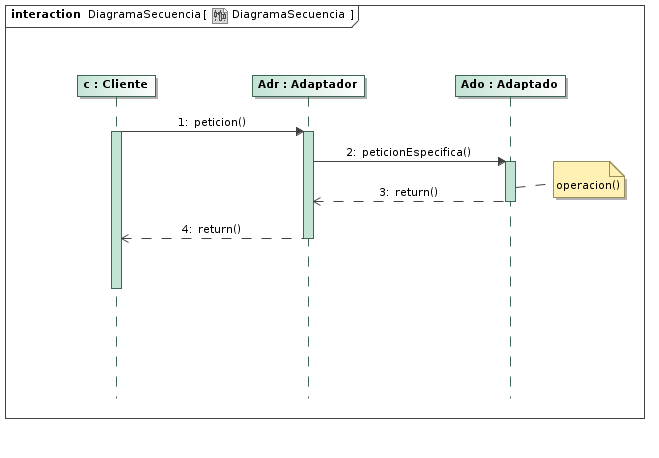 Diagrama de secuencia do patrón de deseño adaptador coa implementación de clase adaptadora.